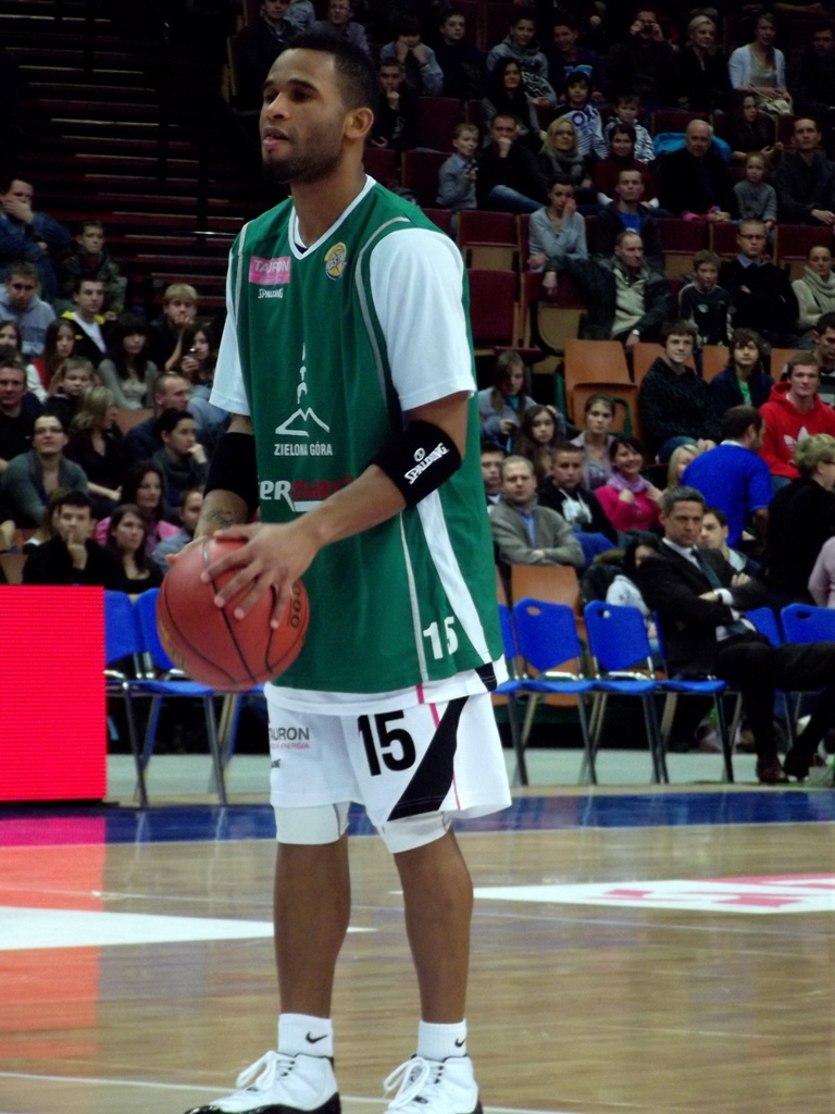 Walter Hodge podczas Meczu Gwiazd Polskiej Ligi Koszykówki 2012.